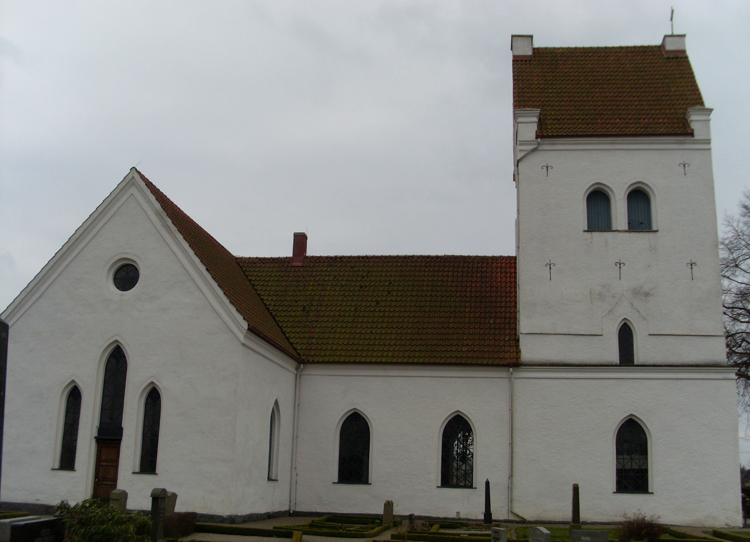 Vollsjö kyrka utanför Vollsjö i Skåne